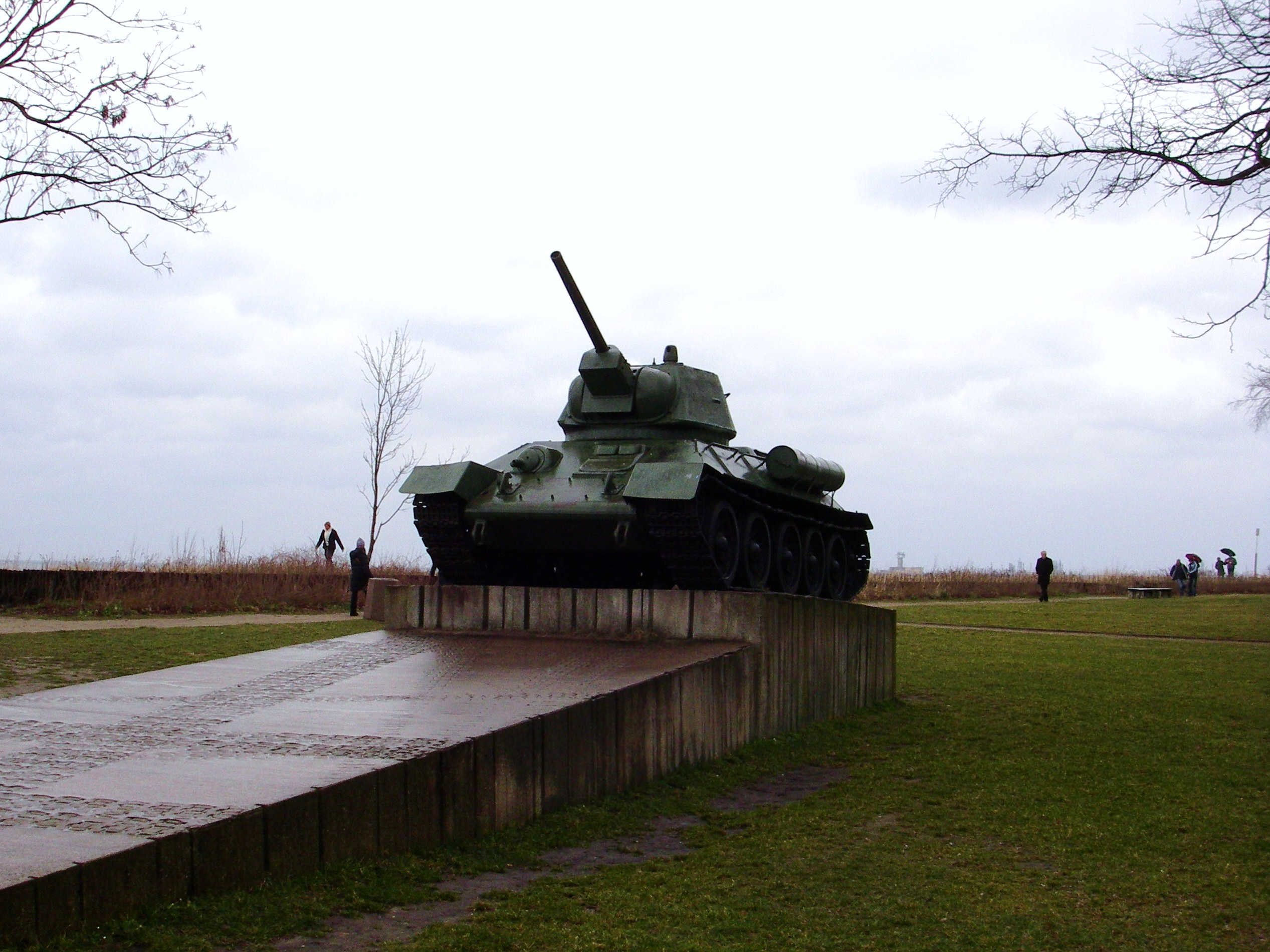 Gdańsk Westerplatte, czołg-pomnik T-34, obecnie usunięty.